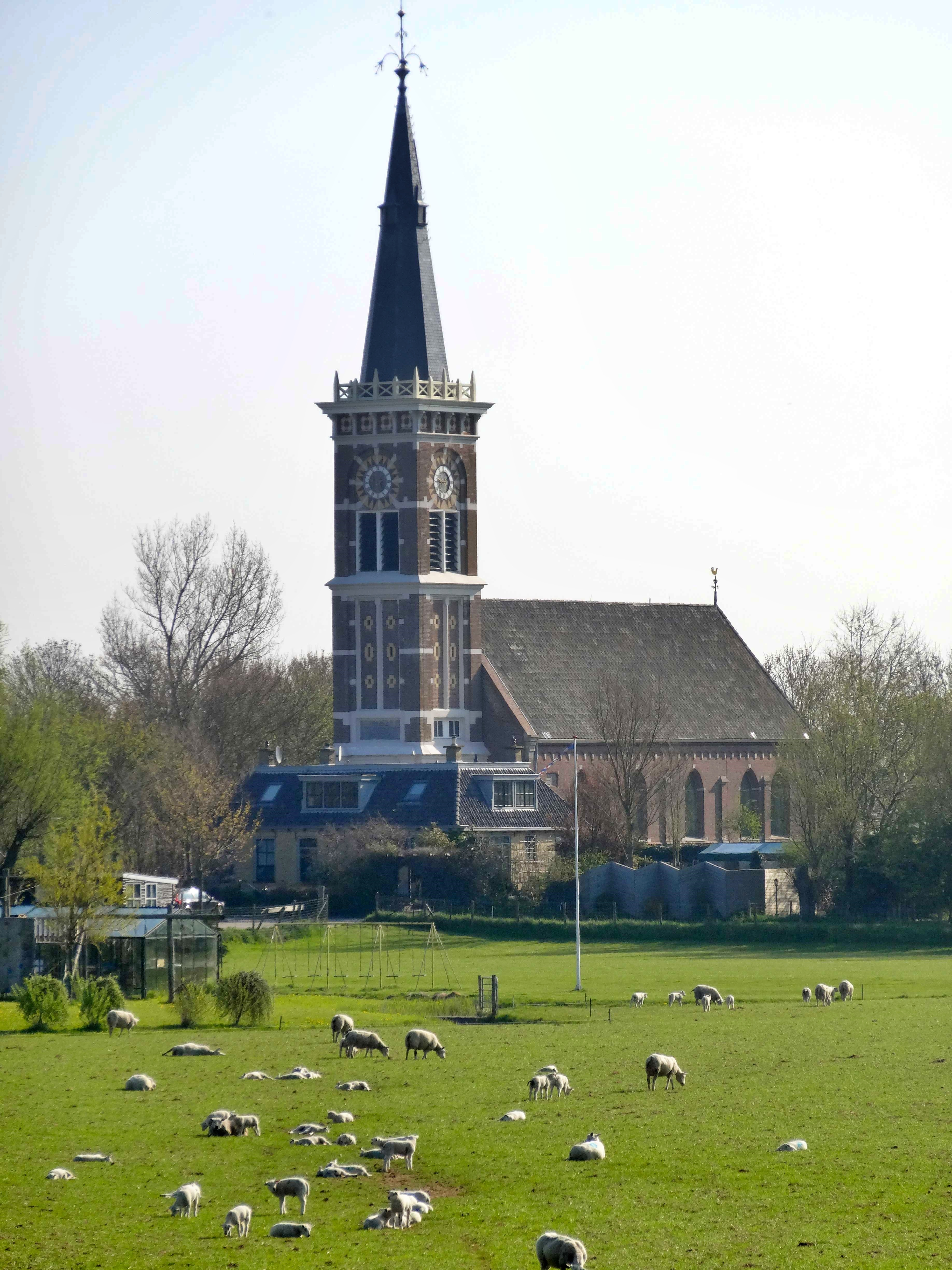 Zicht op Cornwerd met Bonifatiuskerk